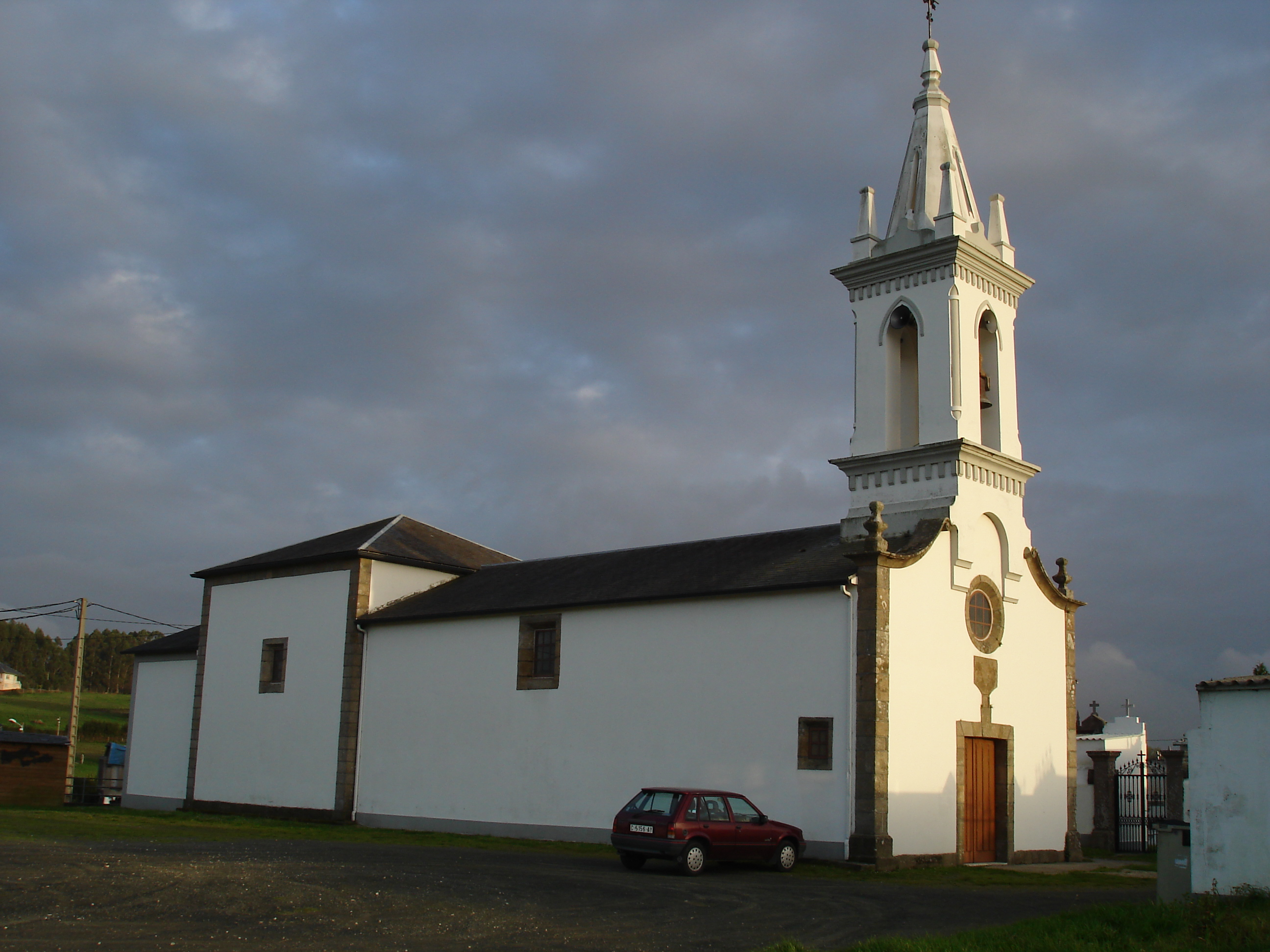 Igrexa de Castro